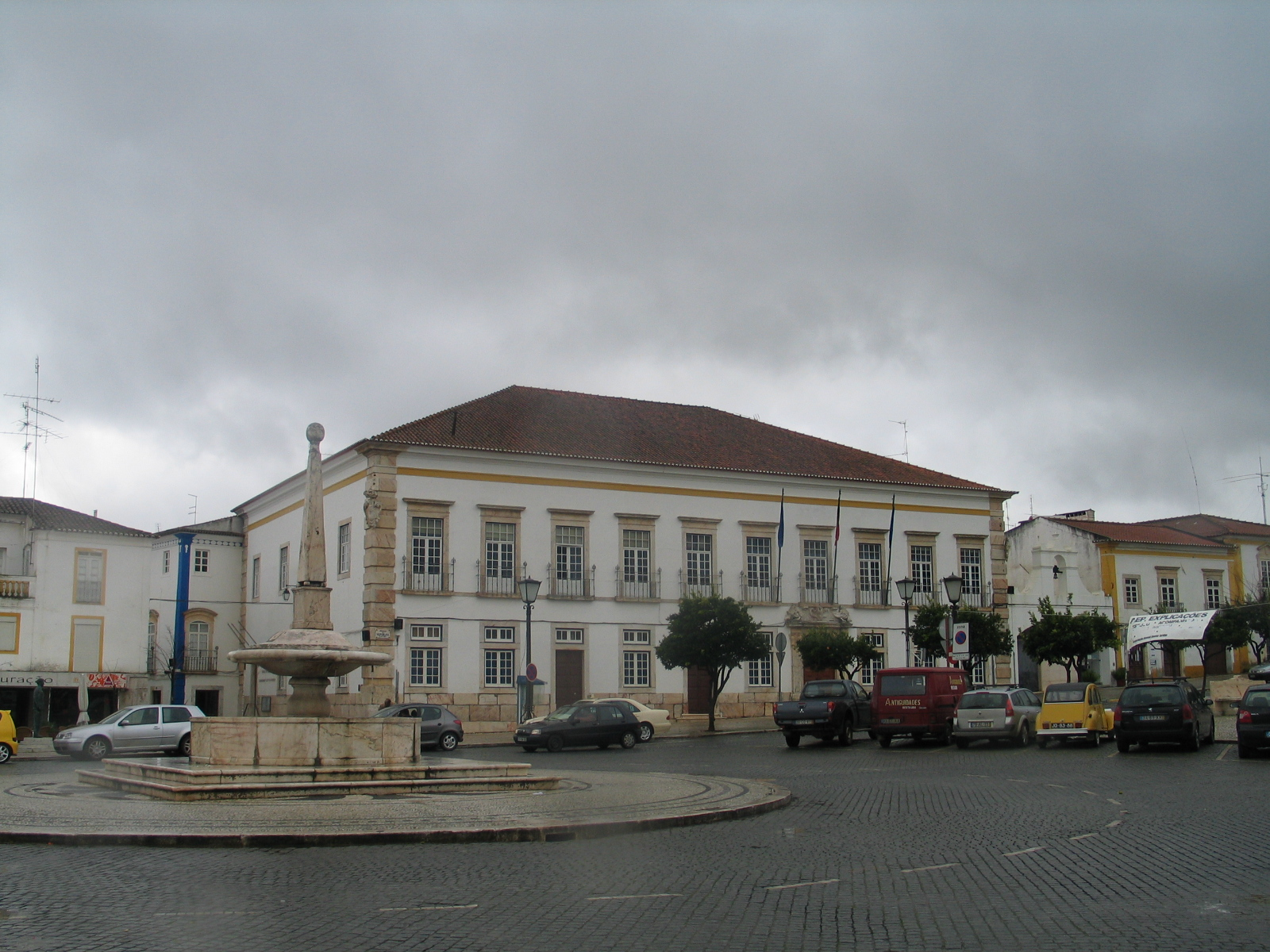 Vila Viçosa (Portugal) - Paços do Concelho /Town Hall